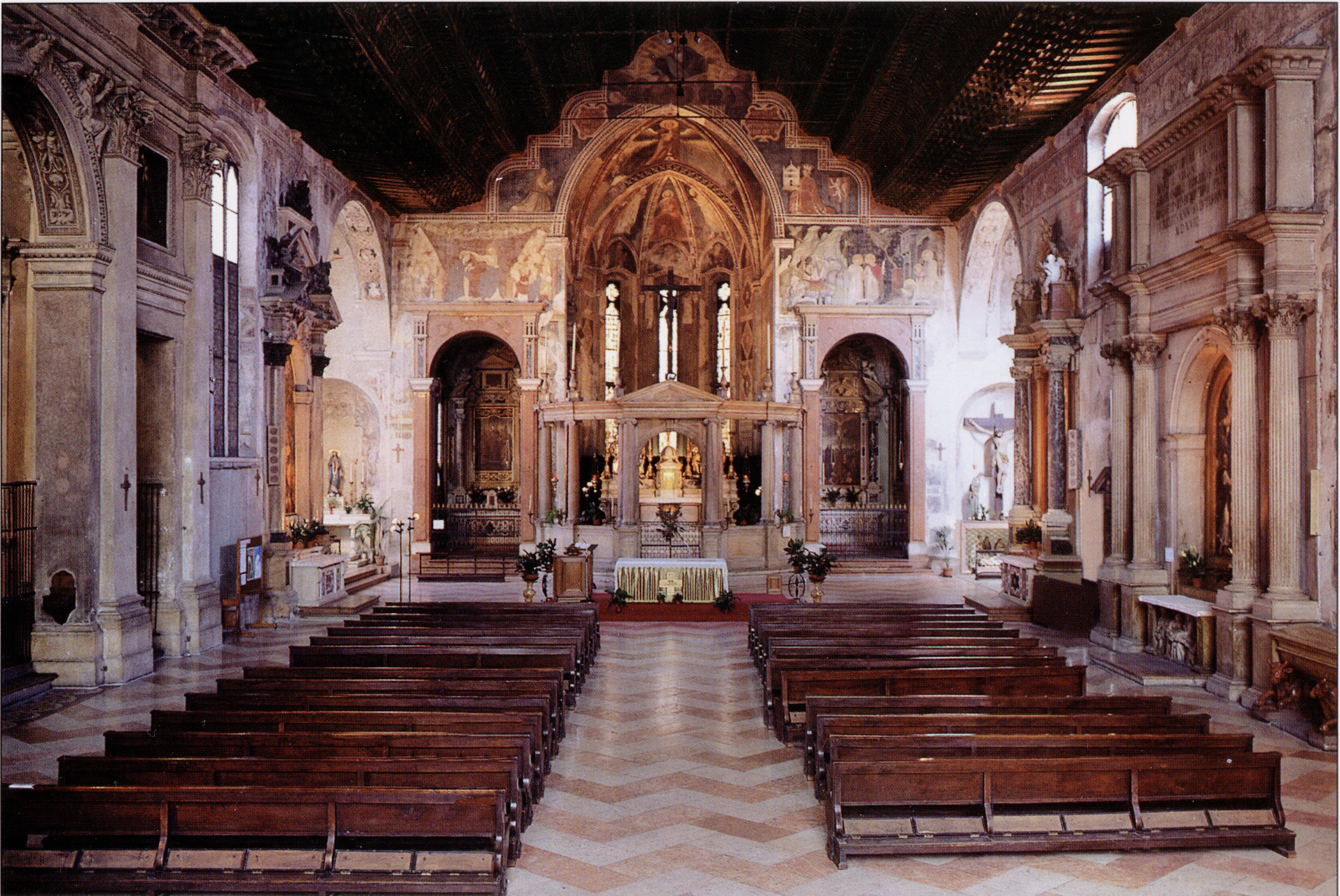 Verona - San Fermo Maggiore - Chiesa Superiore